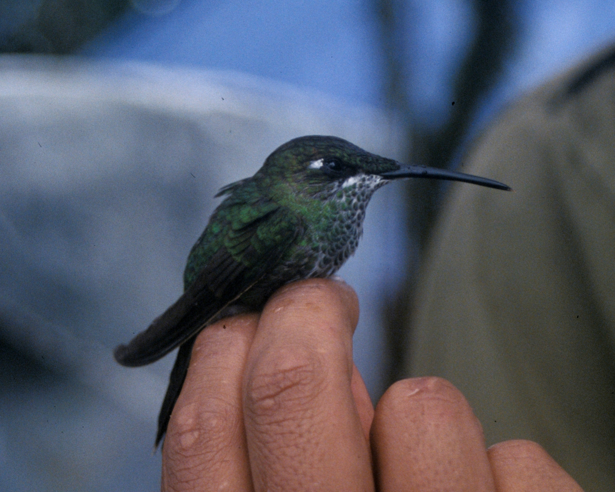 Violet-fronted Brilliant (Heliodoxa leadbeateri). Female from Cordillera del Cóndor, Ecuador.